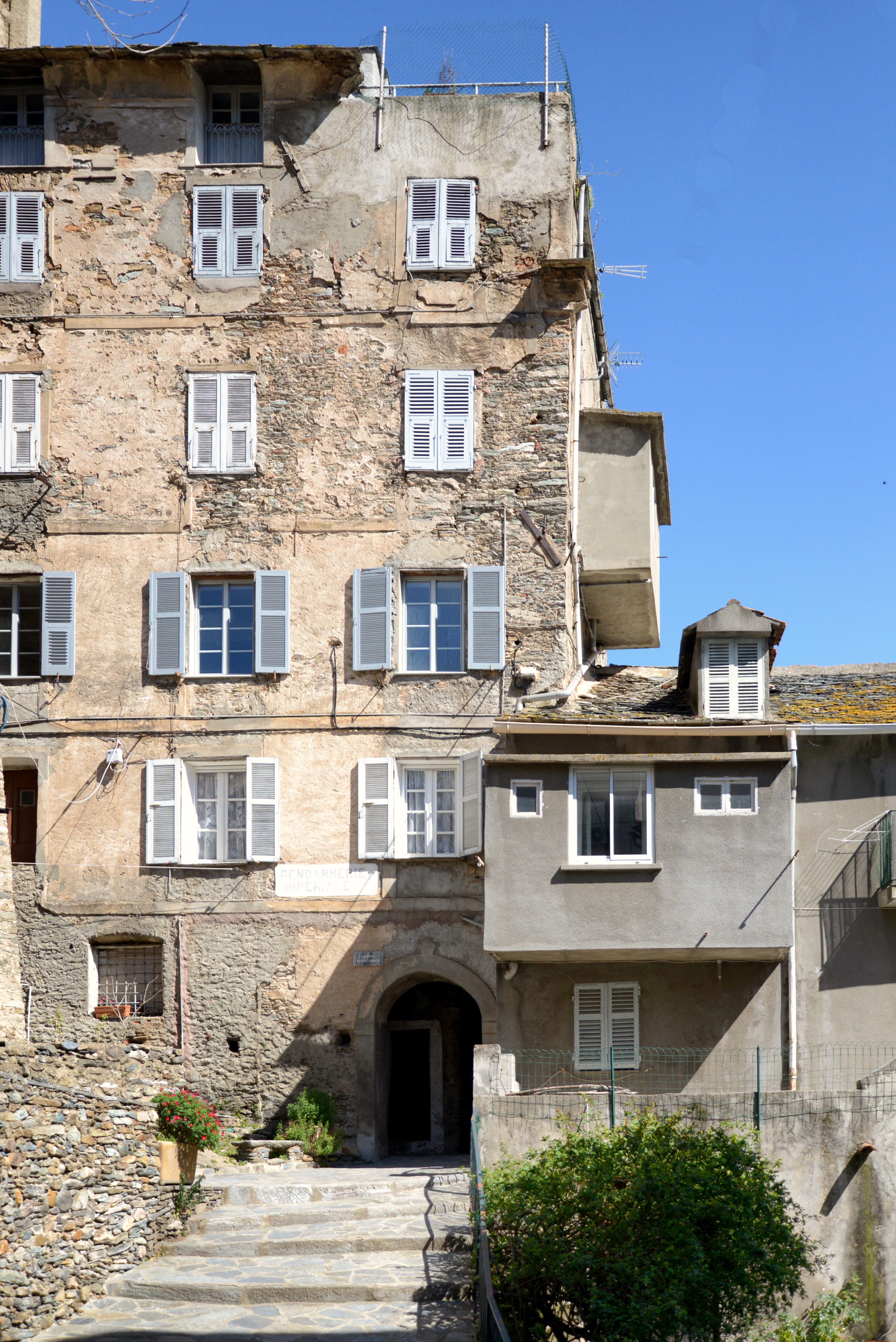 Vescovato, Casinca (Corse) - Immeuble ayant abrité l'ancienne gendarmerie impériale (plaque à la base du 2e niveau entre les deux fenêtres), dans le quartier Santa Croce